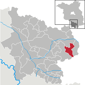 Lichterfeld-Schacksdorf in Brandenburg (Country) - District Elbe-Elster